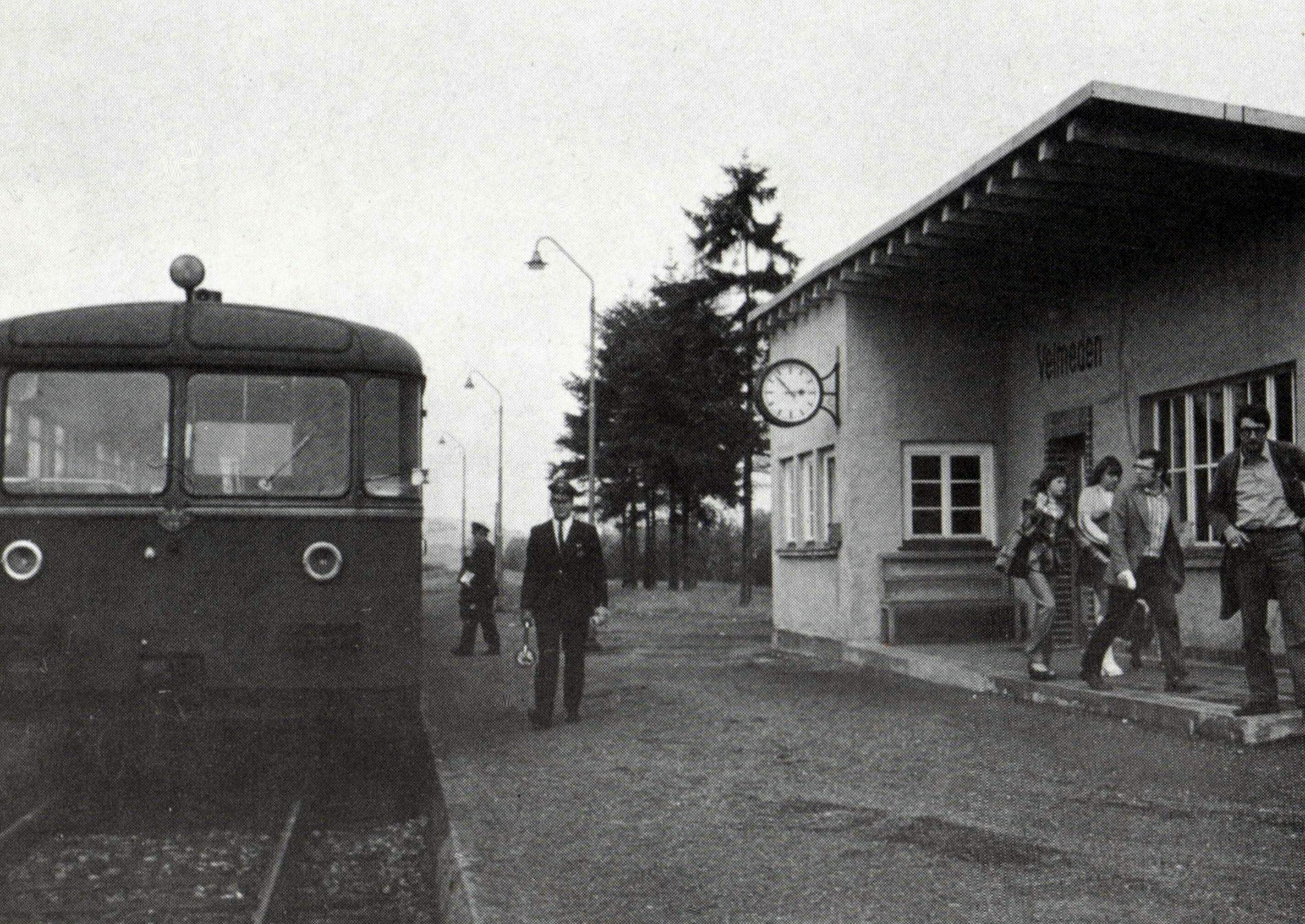 Velmeden - ehem. Bahnhof